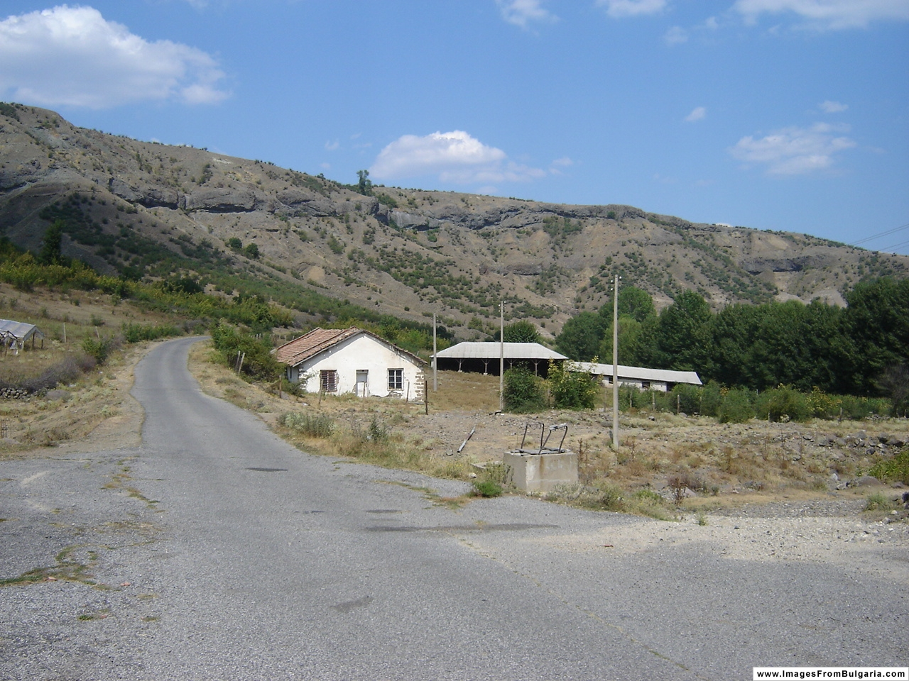 Dolna kula view